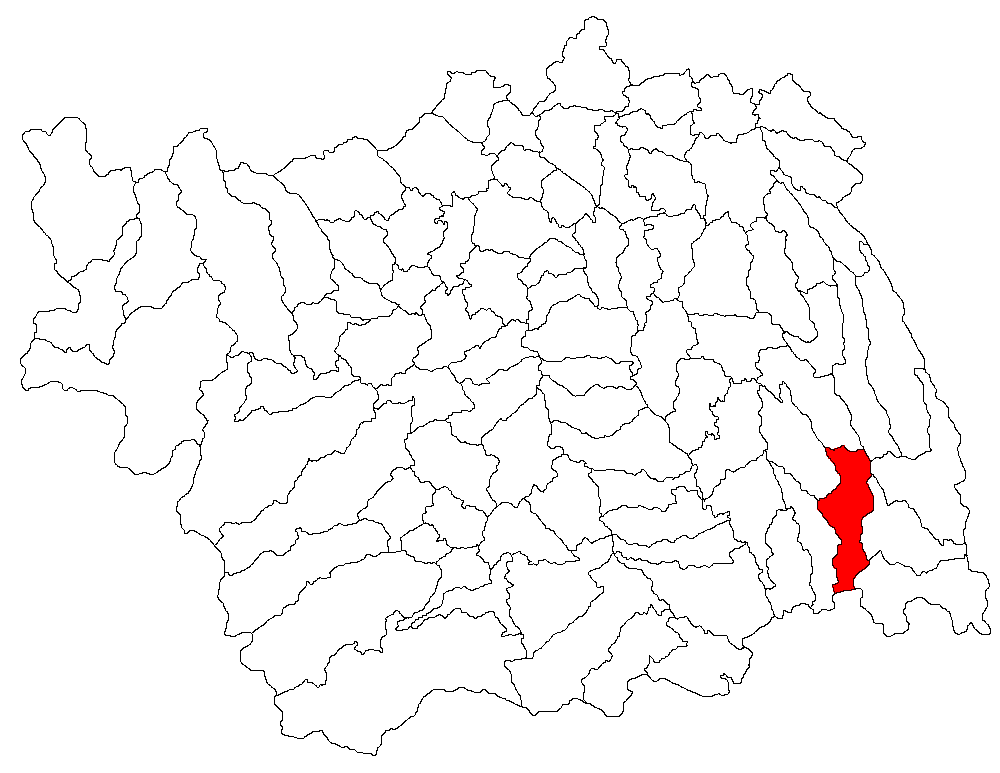 Categorie:Hărţi ale judeţului Bacău